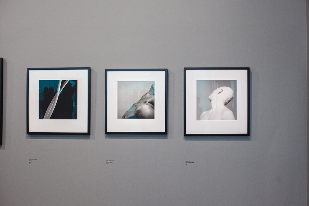 Paris | Ministra da Cultura, Marta Suplicy, visita a exposição Mapplethorpe Rodin. 08.05.2014 Foto: Fernanda Peruzzo